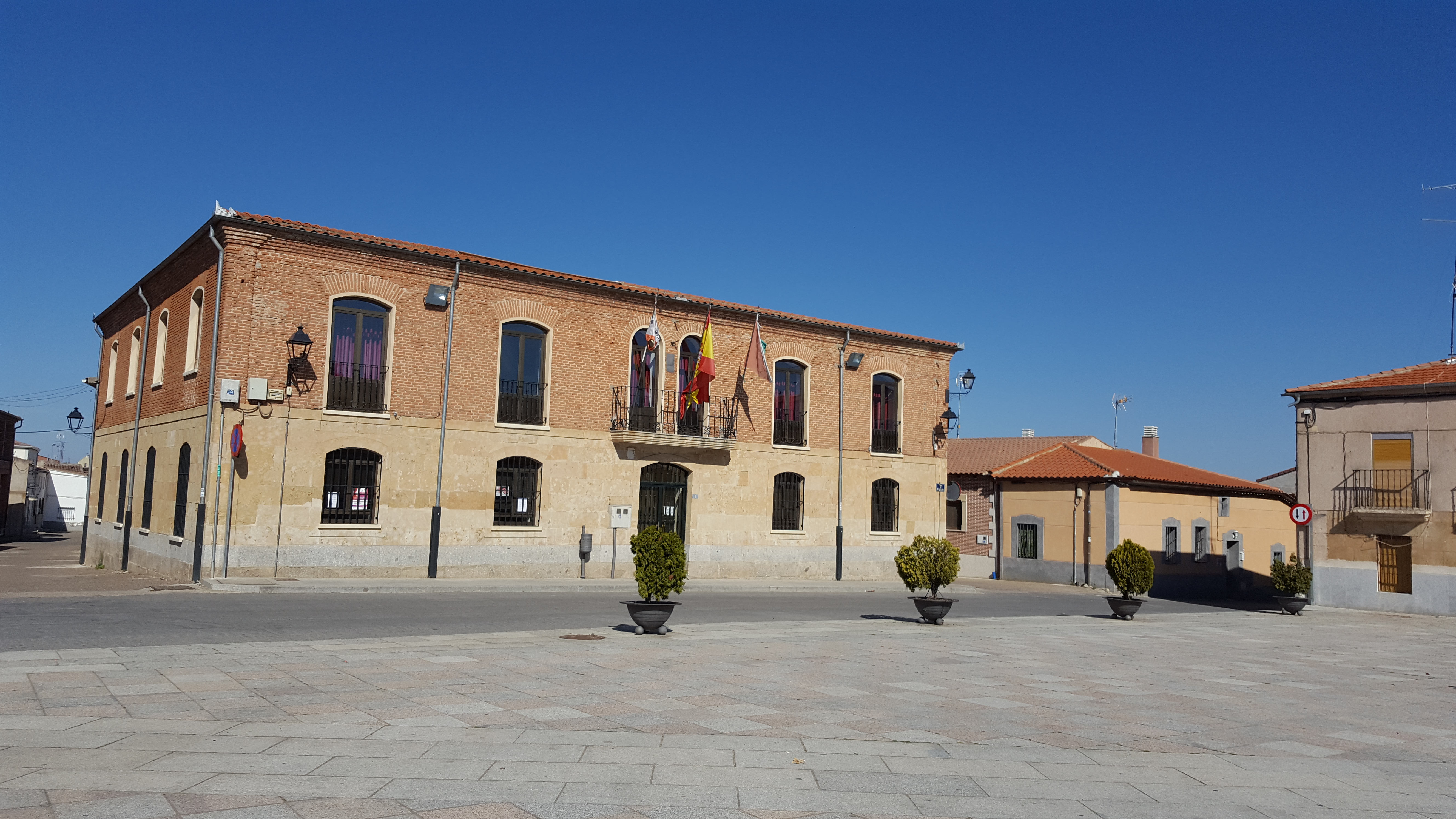 Cantalpino, Salamanca, España